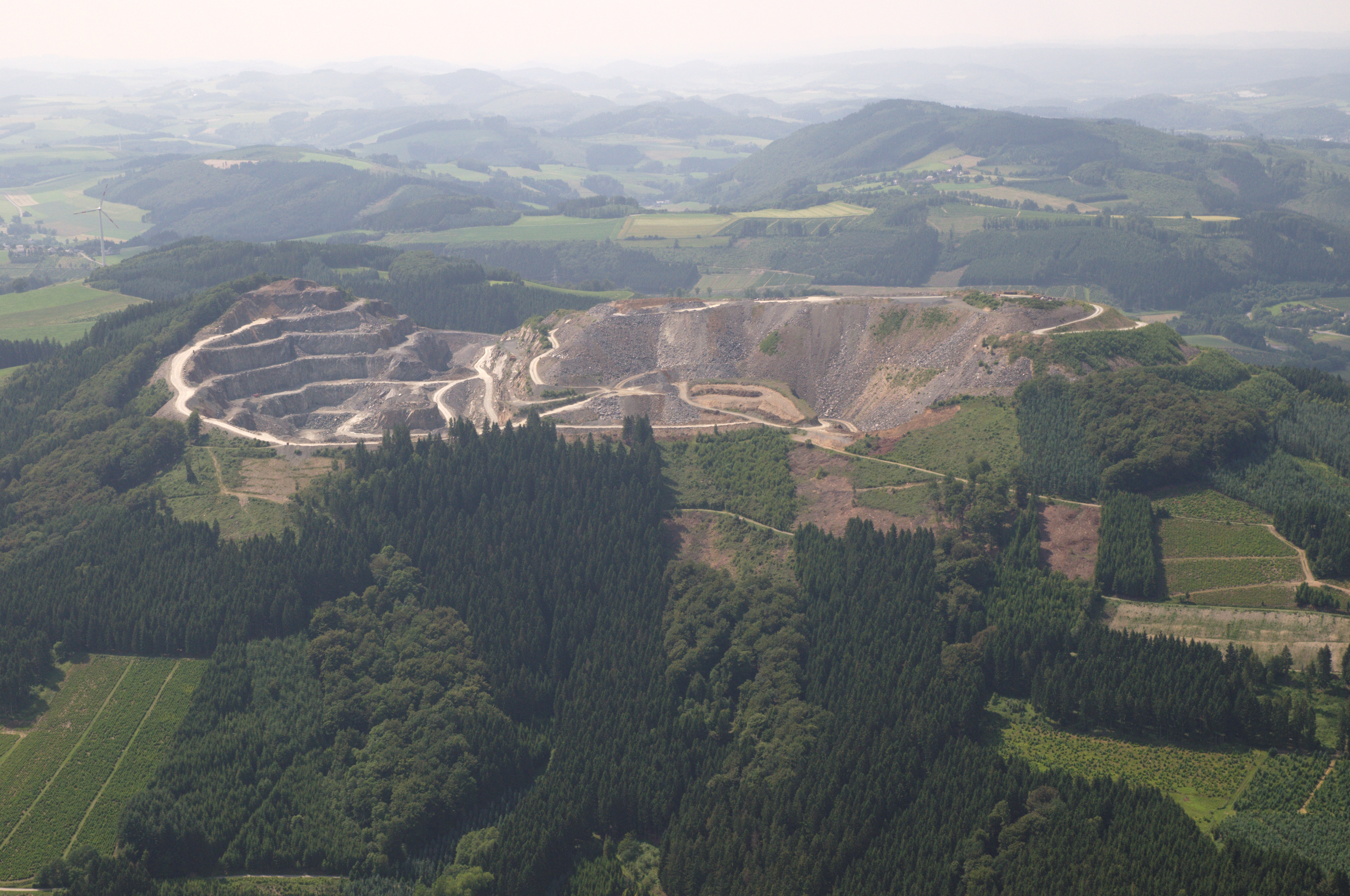 Fotoflug Sauerland-Ost: Diabas-Abbau nordwestlich von Ramsbeck; Blickrichtung Westen, Berge Hardt und Vogelsang bei Meschede